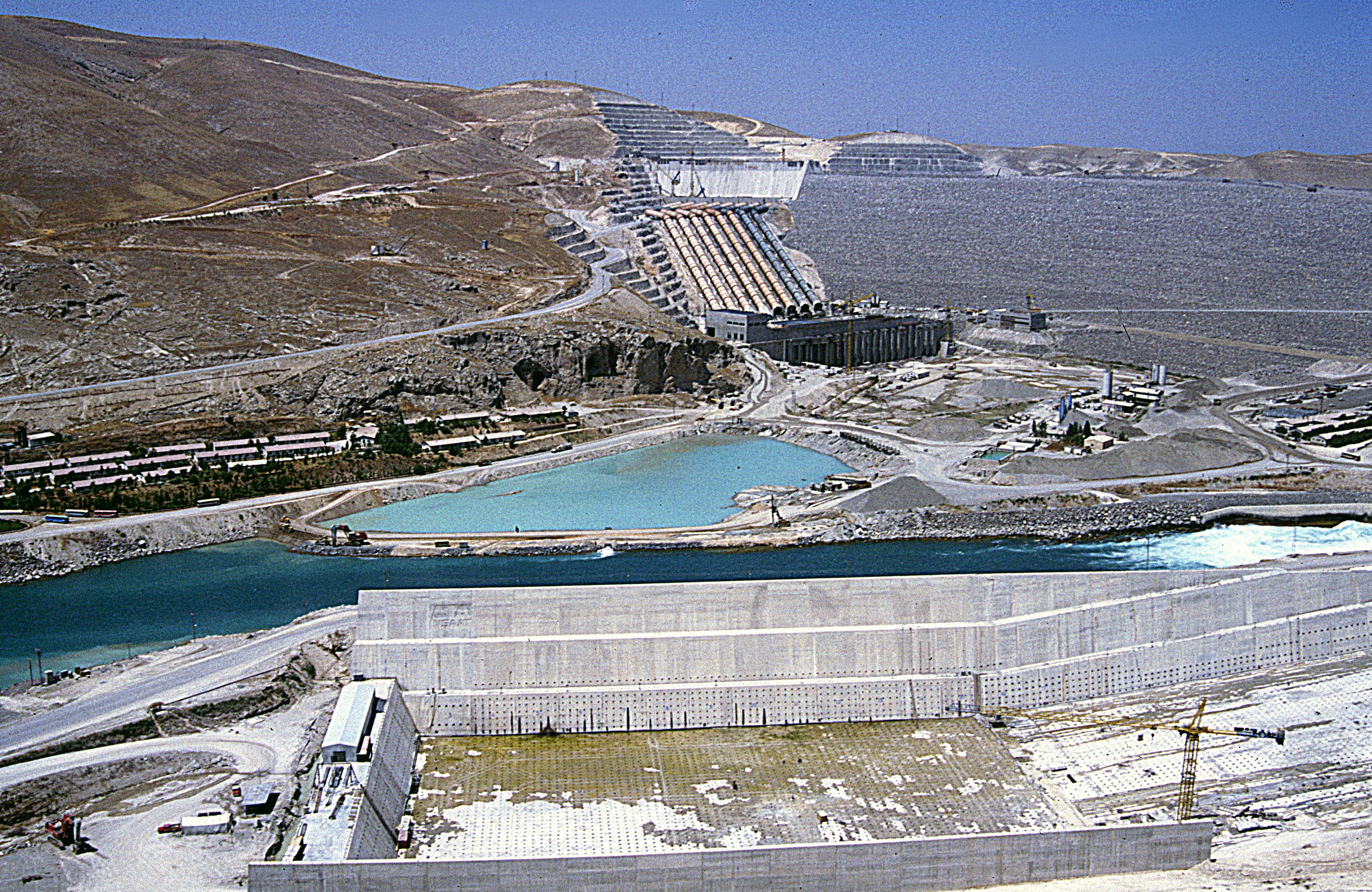 Baustelle des Atatürk-Staudamms am Euphrat